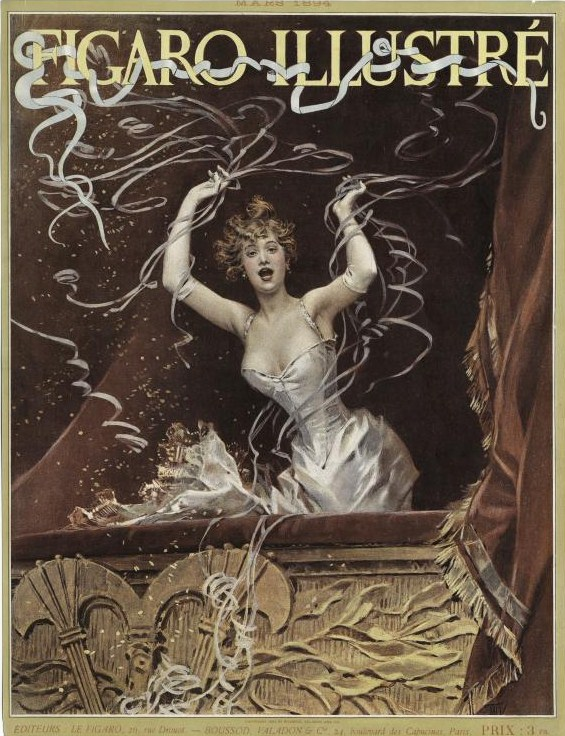 Femme lançant des serpentins.